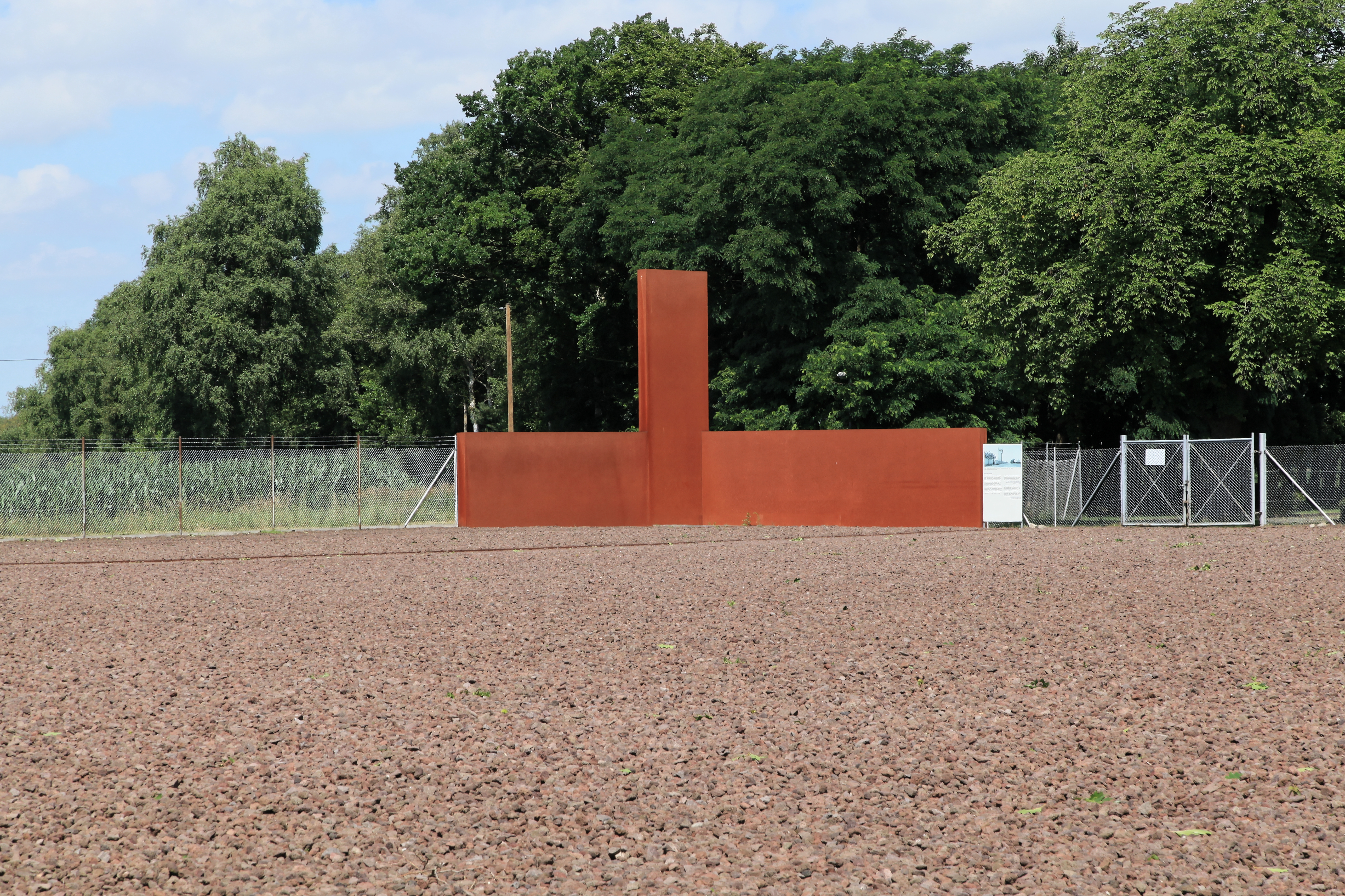 Gedenkstätte Esterwegen, Hinterm Busch in Esterwegen